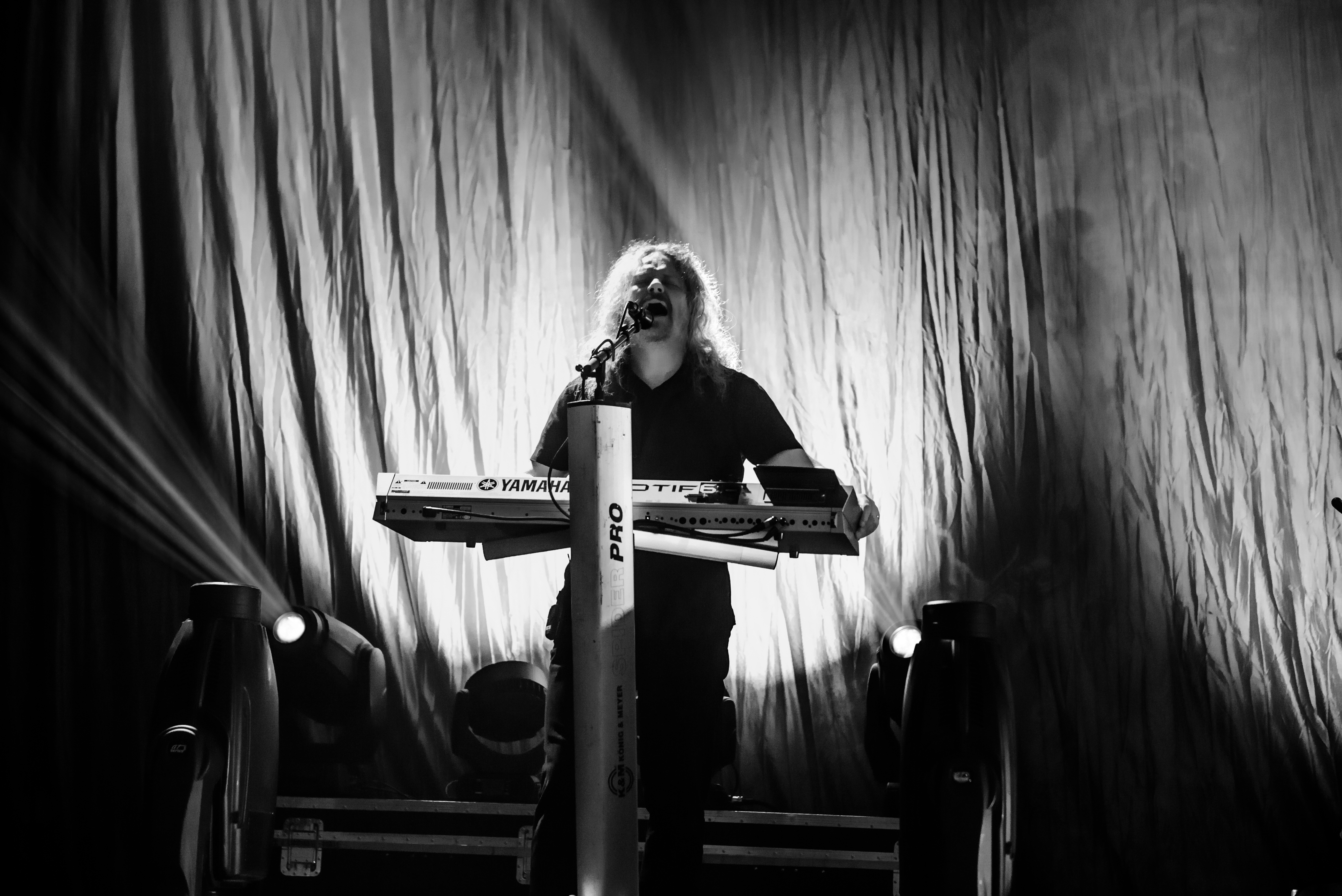 'Ruhrpott Metal Meeting 2016; Oberhausen Turbinenhalle': 'Blind Guardian'